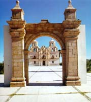 La Purisma Conception: iglesia construida por fco Eusebio Kino.